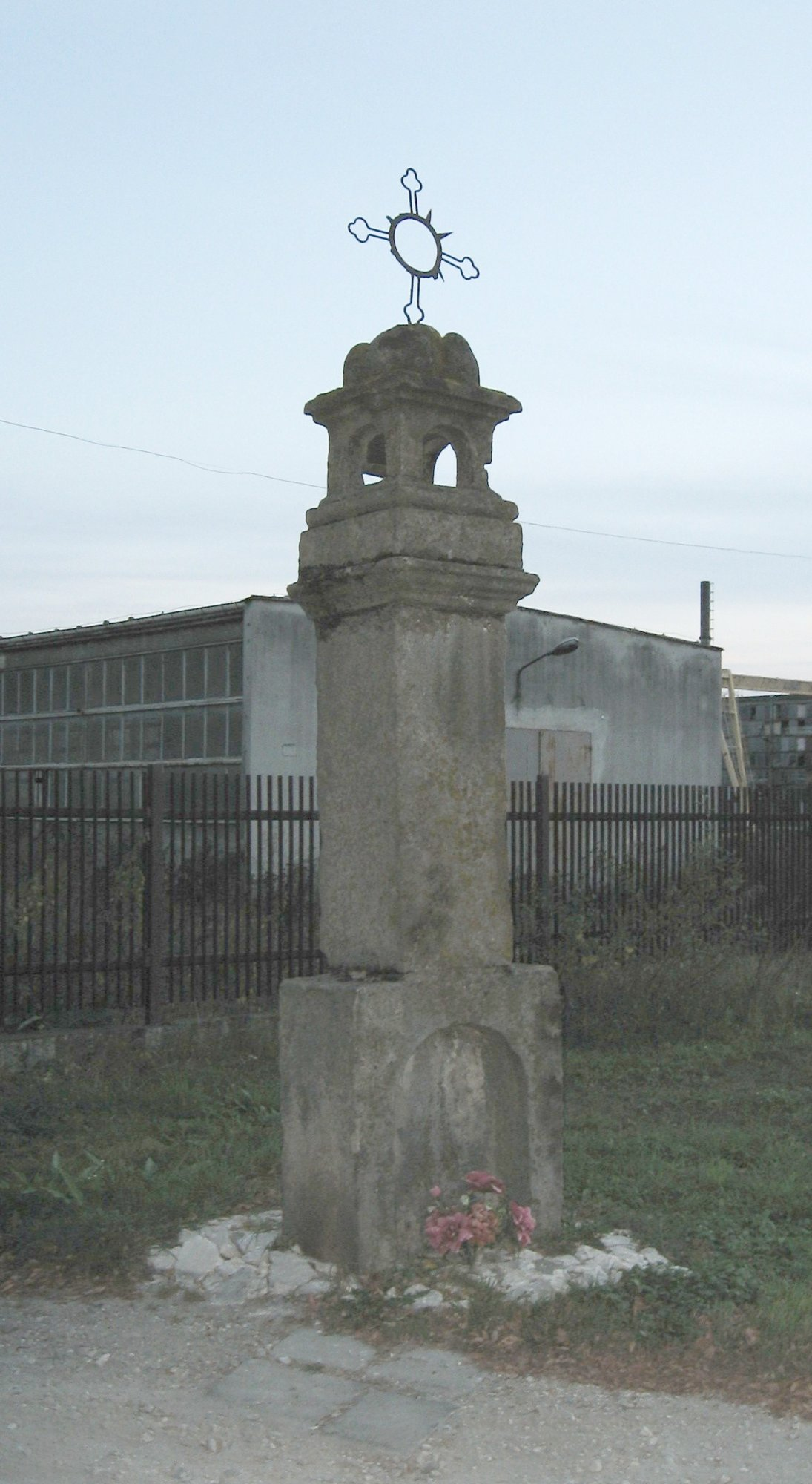 Kapliczka biecka